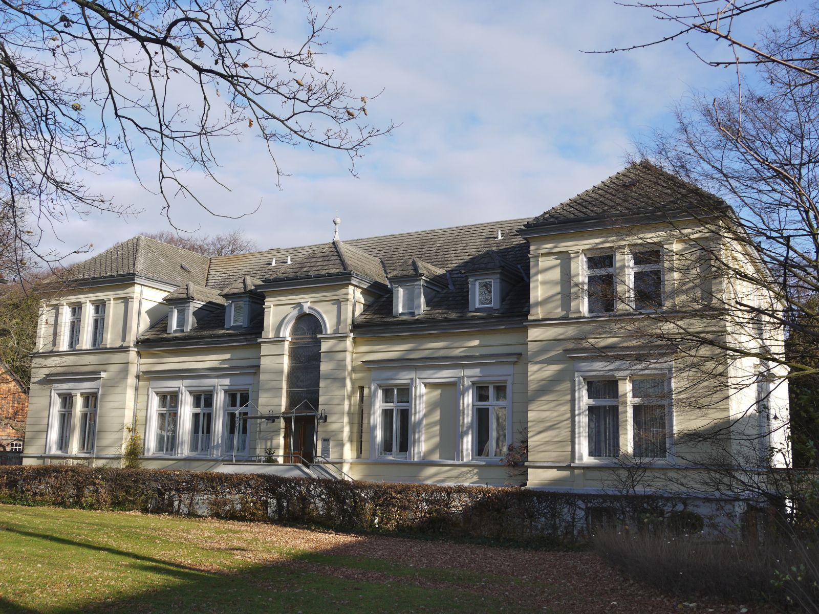 Gutshaus in Salzgitter-Üfingen - Ansicht von der Kirche